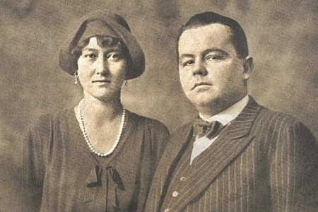 Adolf a Hilda Schwarzenbergovi, 1930